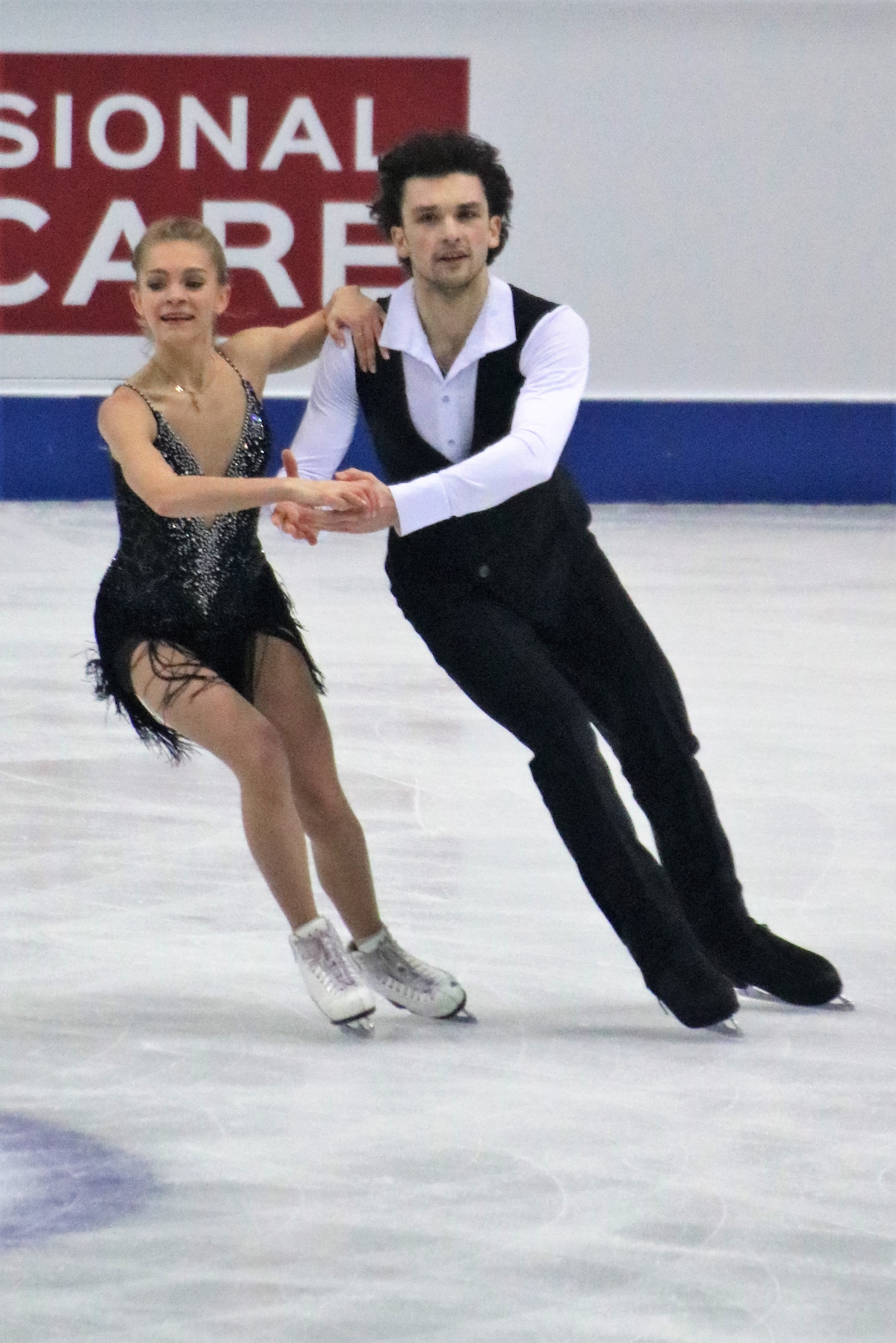 Мария Казакова / Георгий Ревия (Грузия) на финале юниорского Гран-при 2019-2020